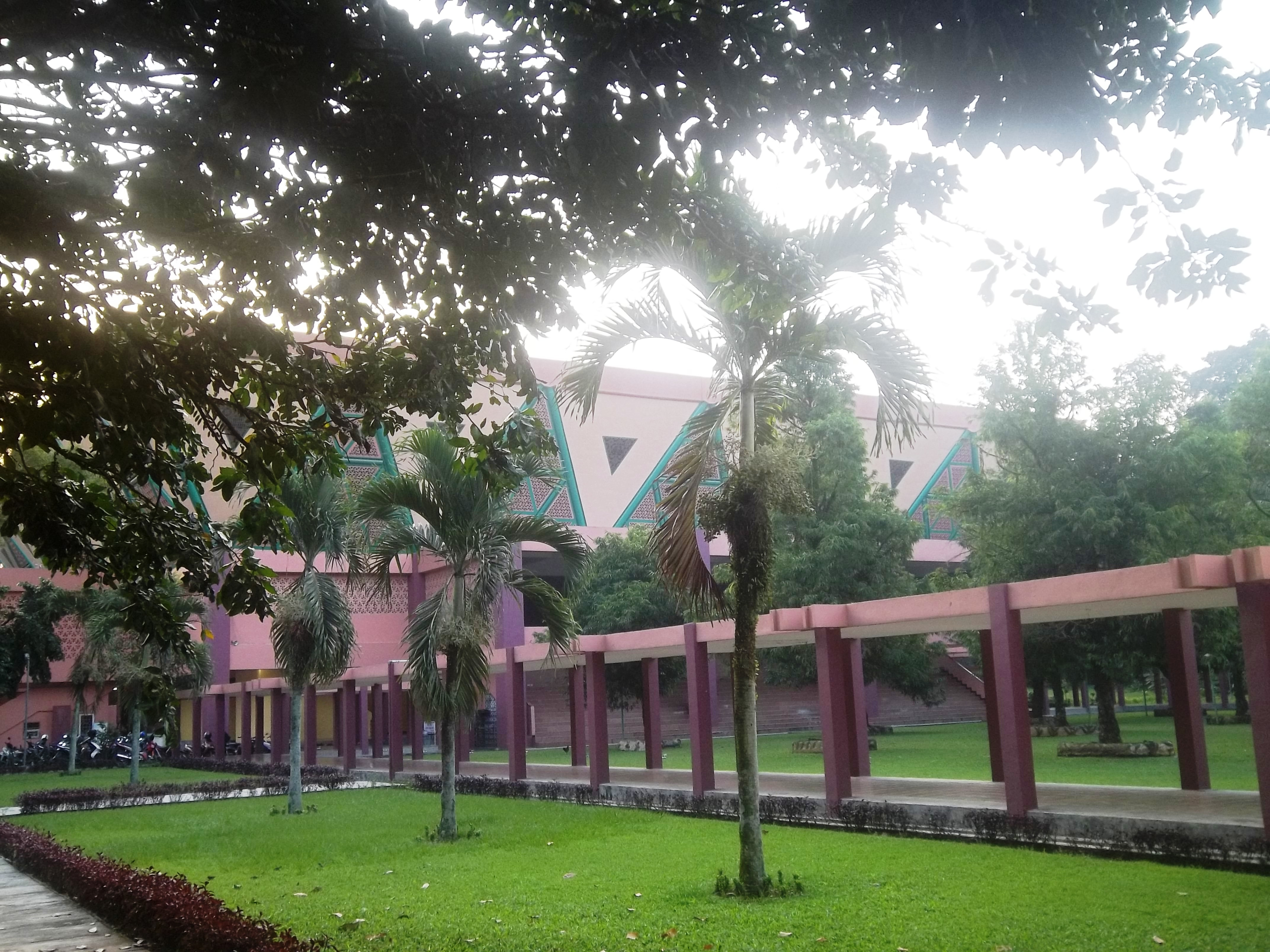 Masjid Al Hurriyyah dilihat dari sudut taman